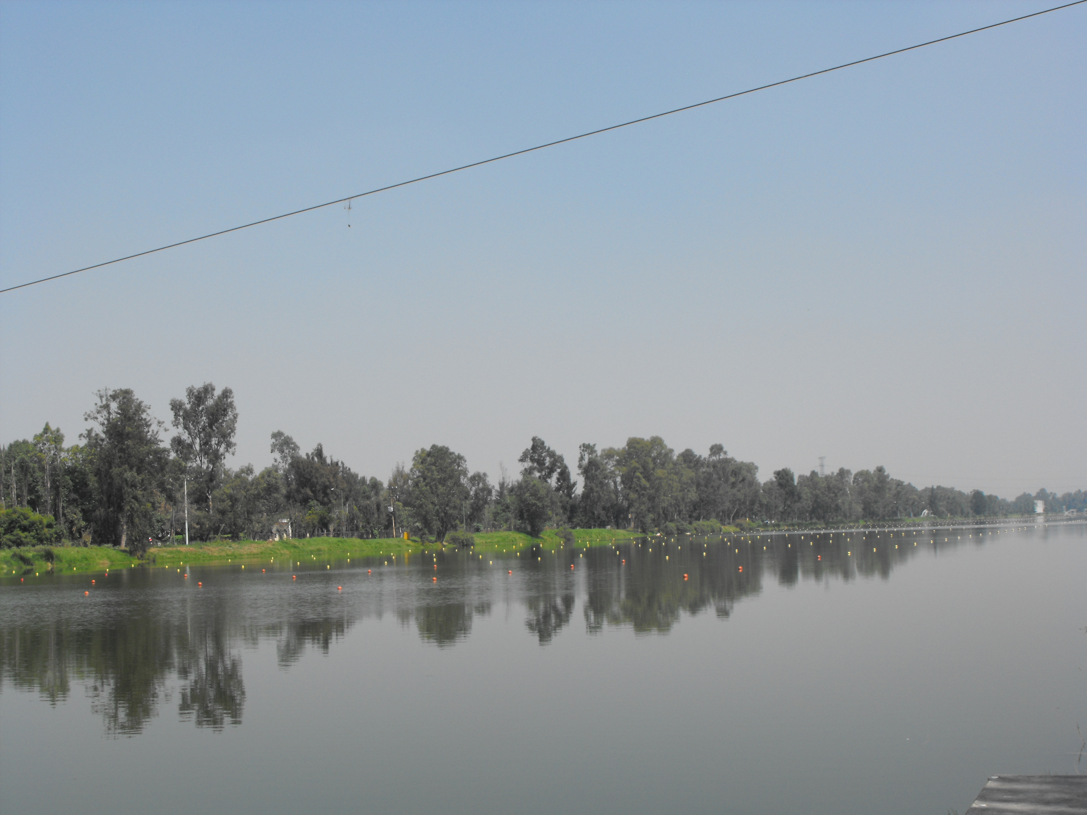 Pista olímpica de remo y canotaje “Virgilio Uribe” ubicada en la zona lacustre de Xochimilco y paralela al canal de Cuemanco, con una longitud de 2200 m, en la ciudad de México.